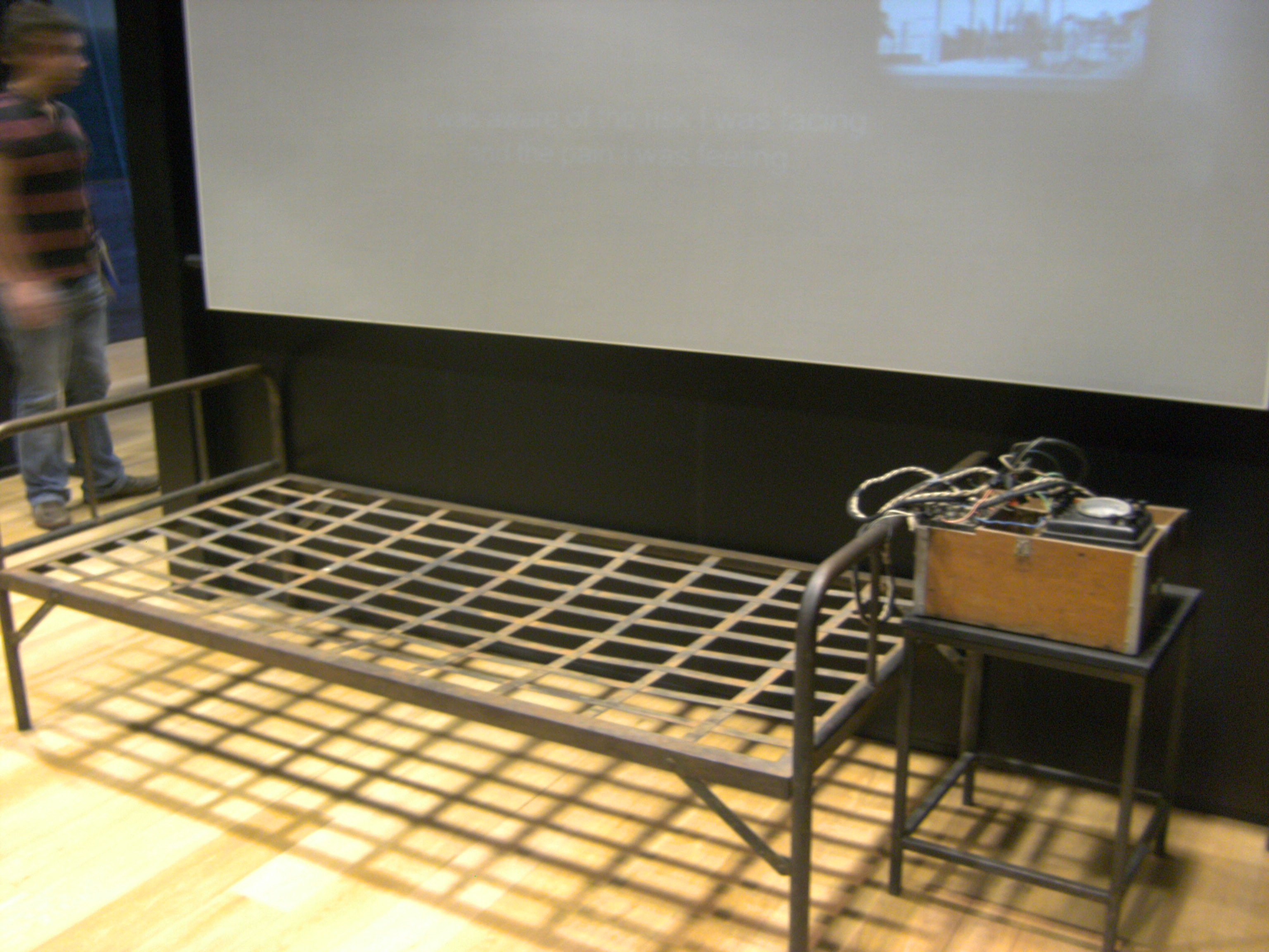 Instrumento de tortura eléctrica usado por agentes del régimen de Pinochet en exhibición del Museo de la Memoria y los Derechos Humanos de Chile